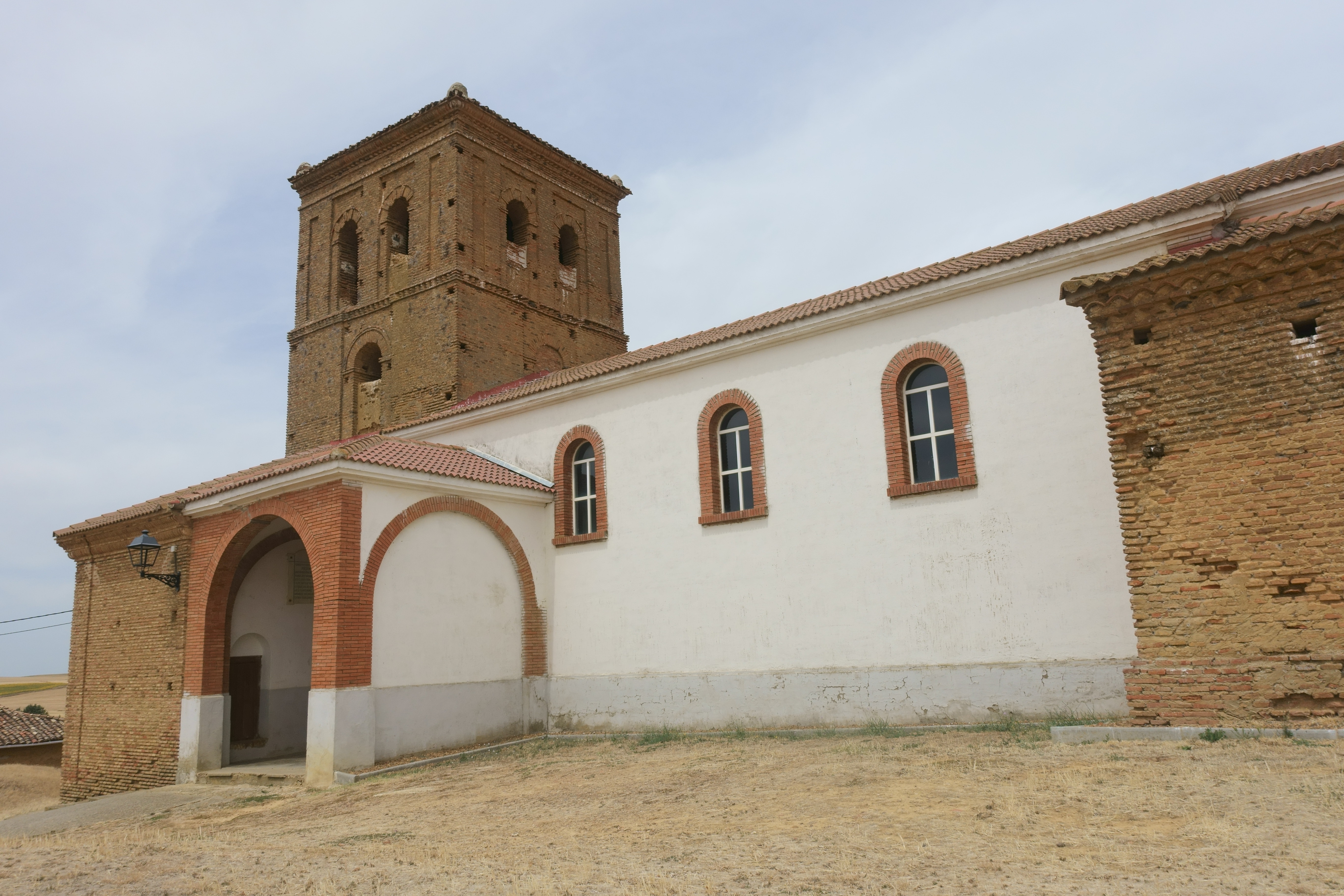 Iglesia de Santiago Apóstol, Abastas (Palencia, España).